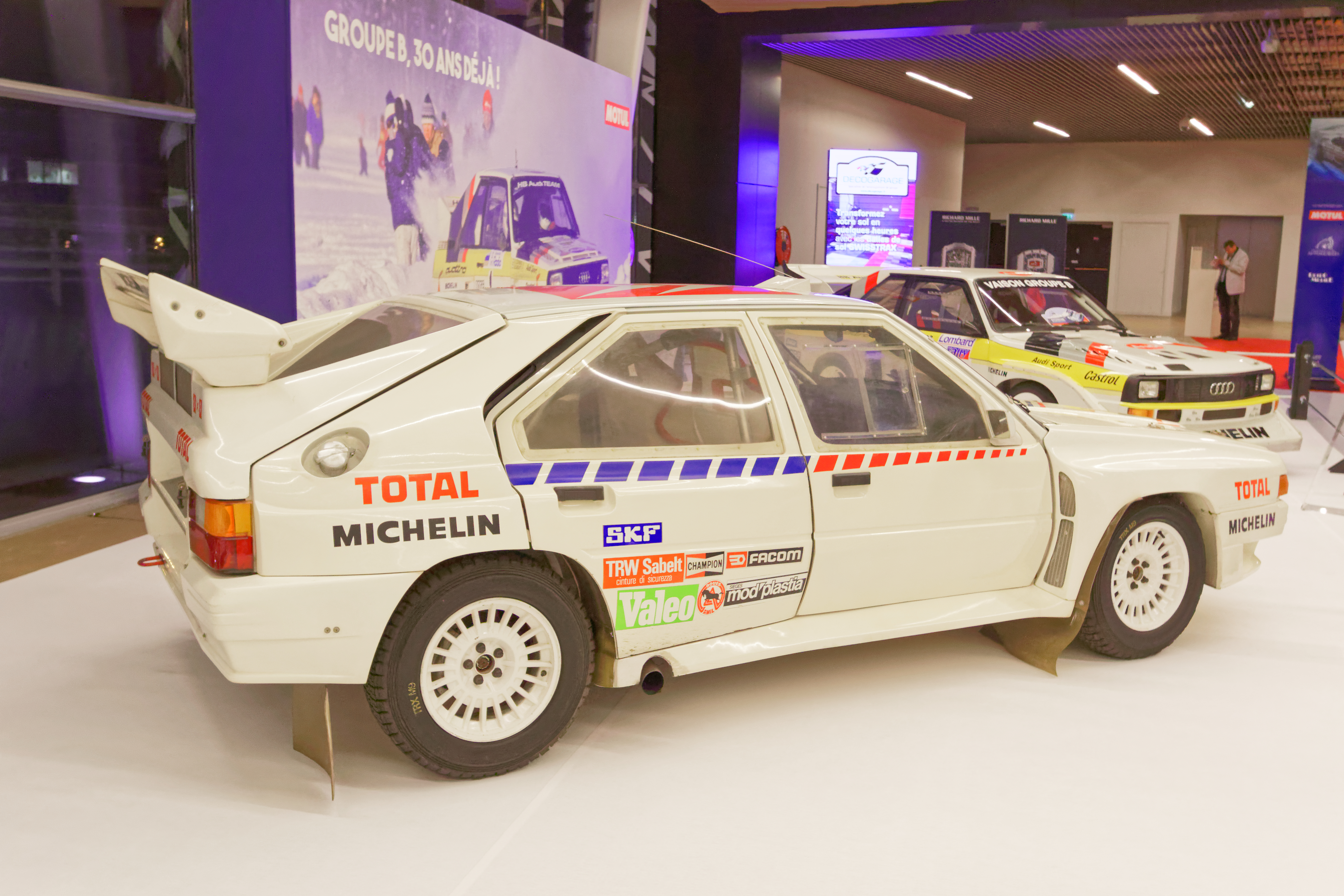 Une Citroën BX 4TC Evolution de 1985 exposée lors du salon Rétromobile 2017.